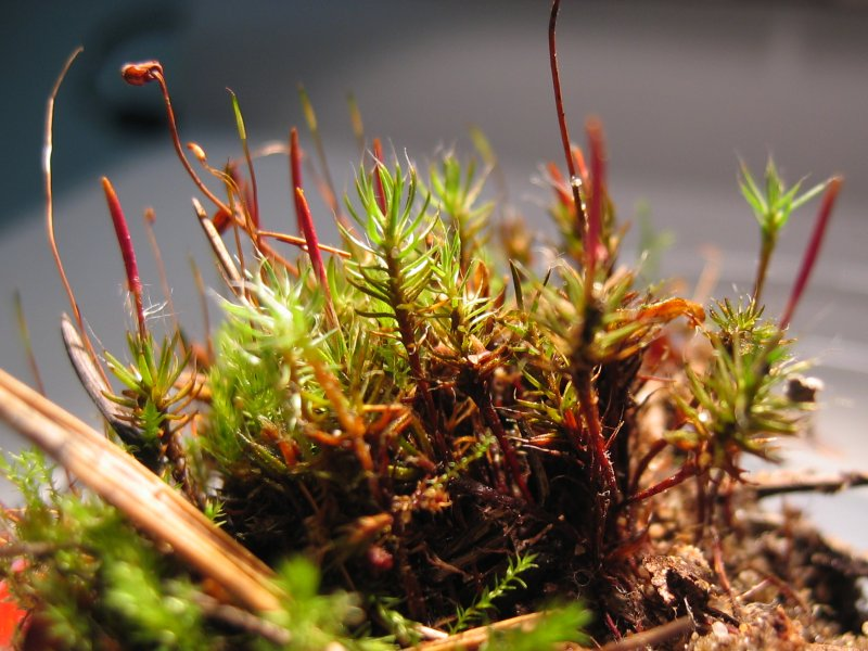 Haartragendes Frauenhaarmoos Polytrichum piliferum, Rostock